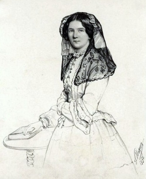 Княгиня Екатерина Николаевна Урусова, ур. Сипягина (1827—1894)